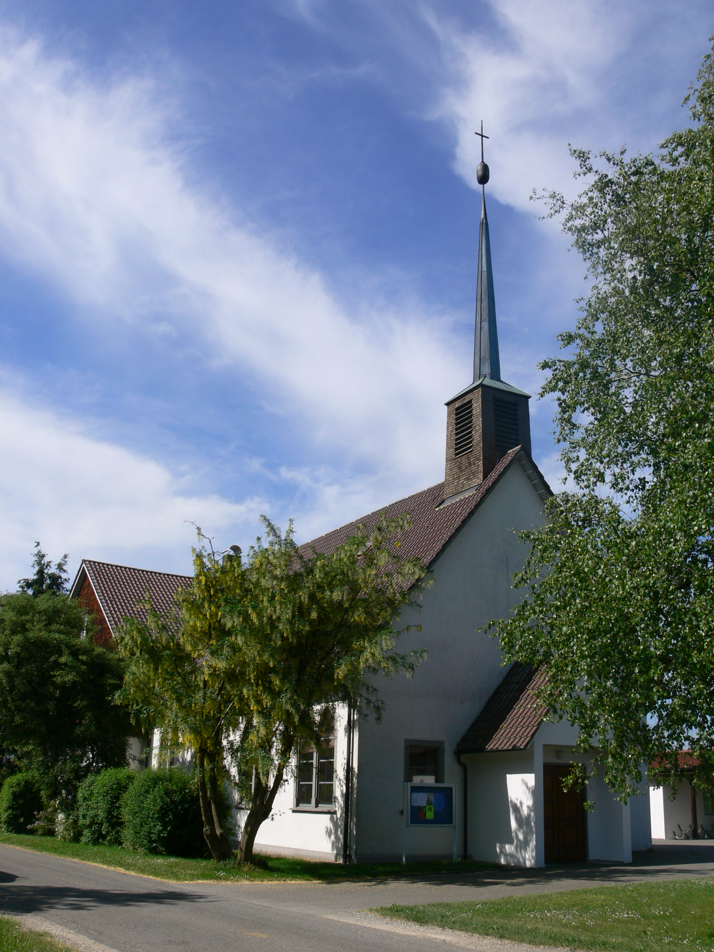 Evangelische Kirche Wälde-Winterbach, Horgenzell, Ortsteil Winterbach